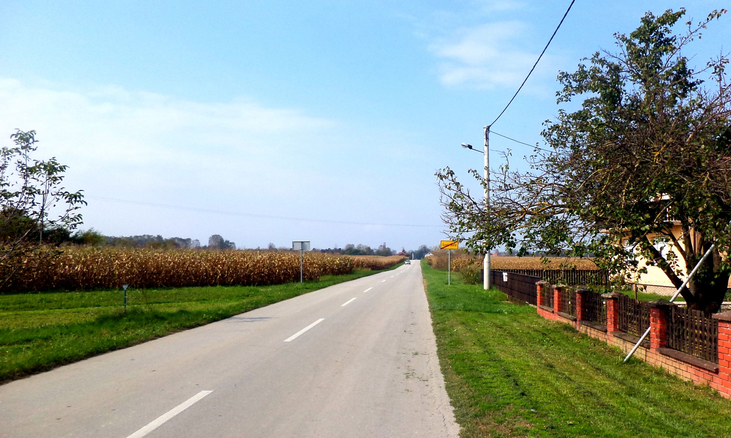 Sv. Đurđ, Ludbreg